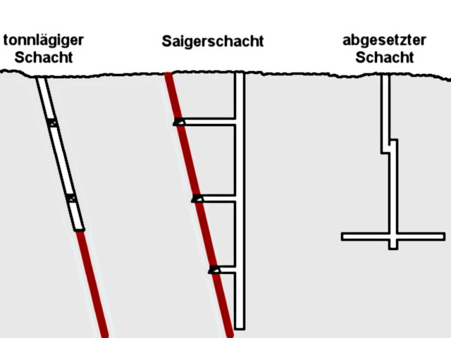 Arten von Schächten (Bergbau)